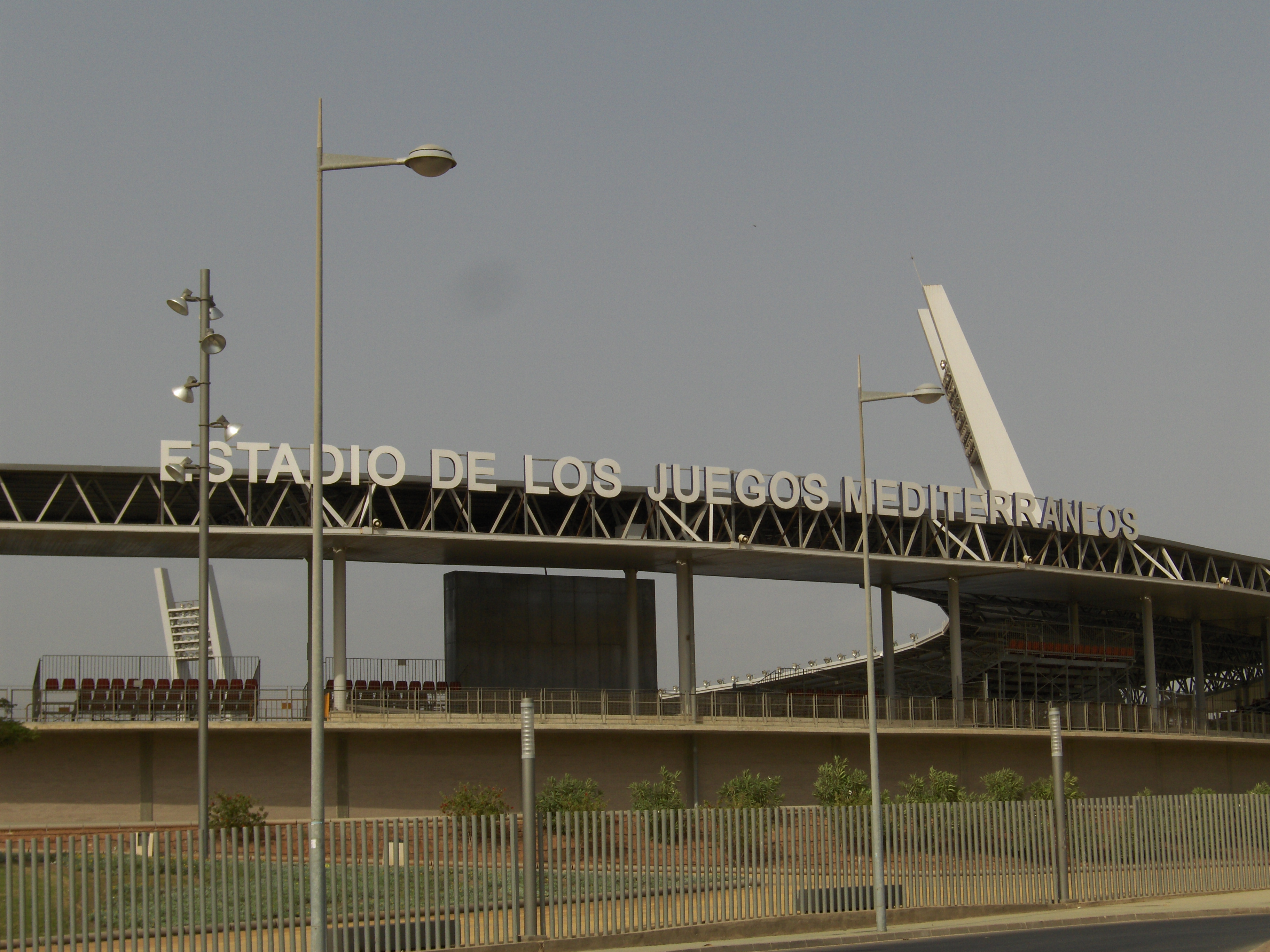 Vista frontal del Estadio Mediterráneo